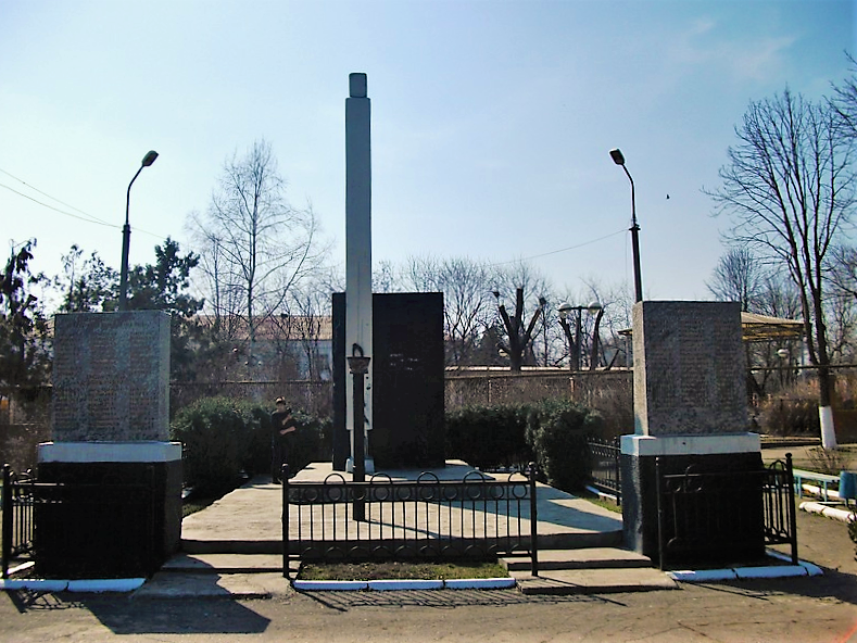 Мемориал жителям станицы Орджоникидзевская, павшим в годы Великой Отечественной войны